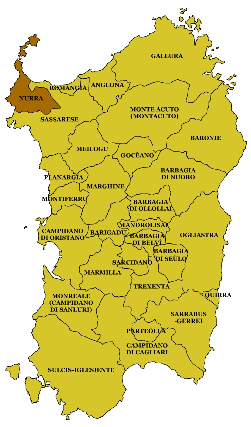 Sardinian Subregions